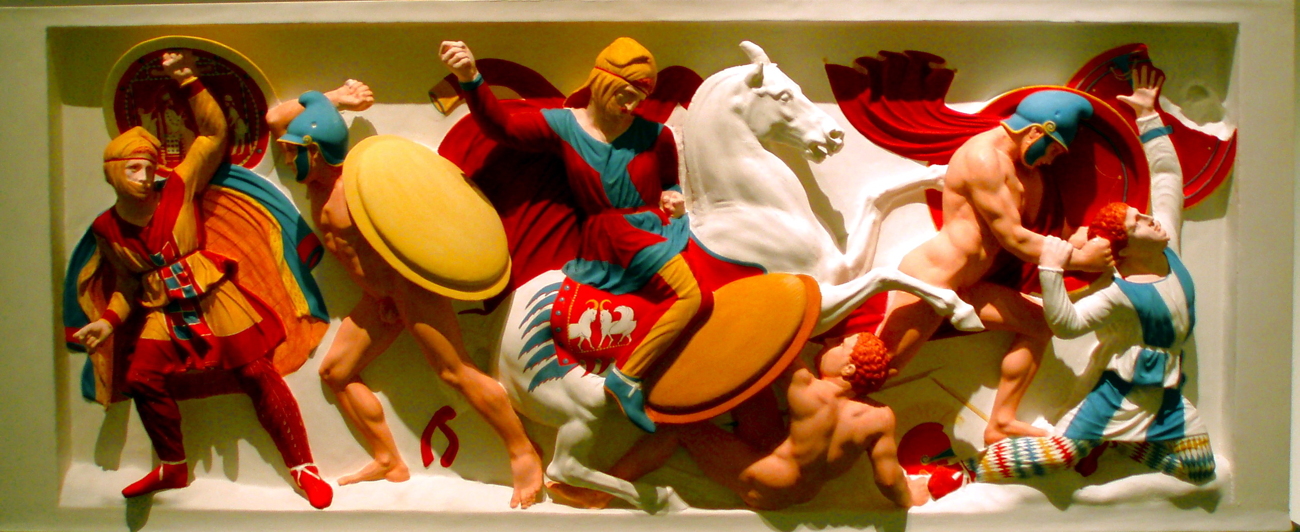 Restitution du décor polychrome du sarcophage dit d'Alexandre, provenant de la nécropole royale de Sidon, représentant la bataille d'Issos. Etude : Vinzenze Brinkmann et Ulrike Koch-Brinkmann. Stéréolithographie : Alphaform, Munich. Restauration des parties manquantes : Joseph Kotti, Sylvia Kellner. Peinture : Ulrike Koch-Brinkmann. Original : Musée national archéologique d'Istanbul. Exposition « Bunte Götter » dans la version montrée à Athènes.